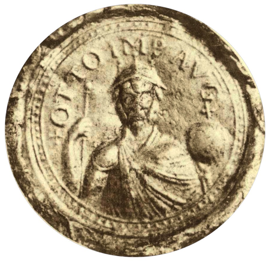 Siegel Otto I., genaue Beschreibung: Die Siegel der Deutschen Kaiser und Könige:Band 5:Seite 12, Nr. 5